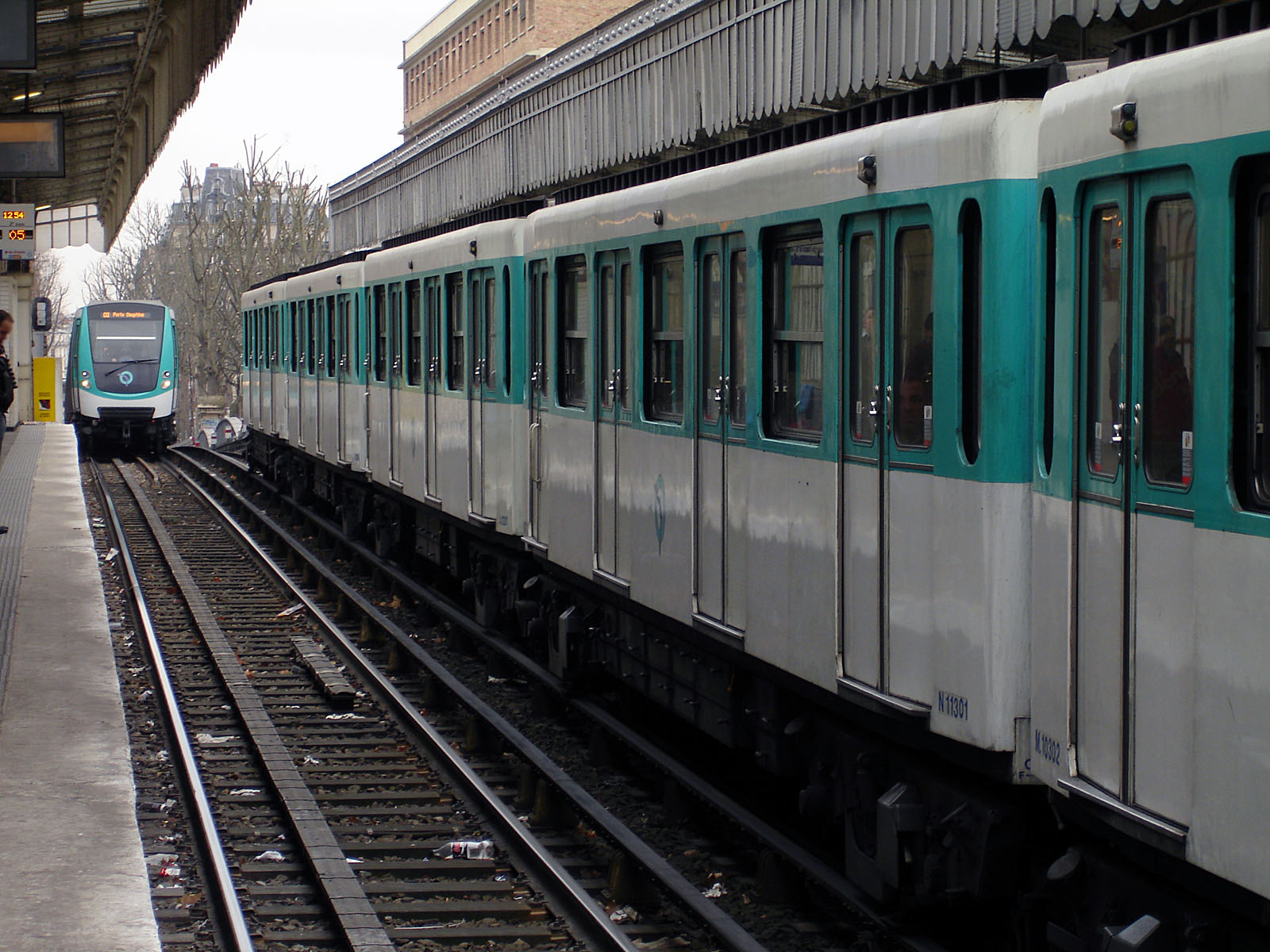 Station Jaurès de la ligne 2 du métro de Paris, France.